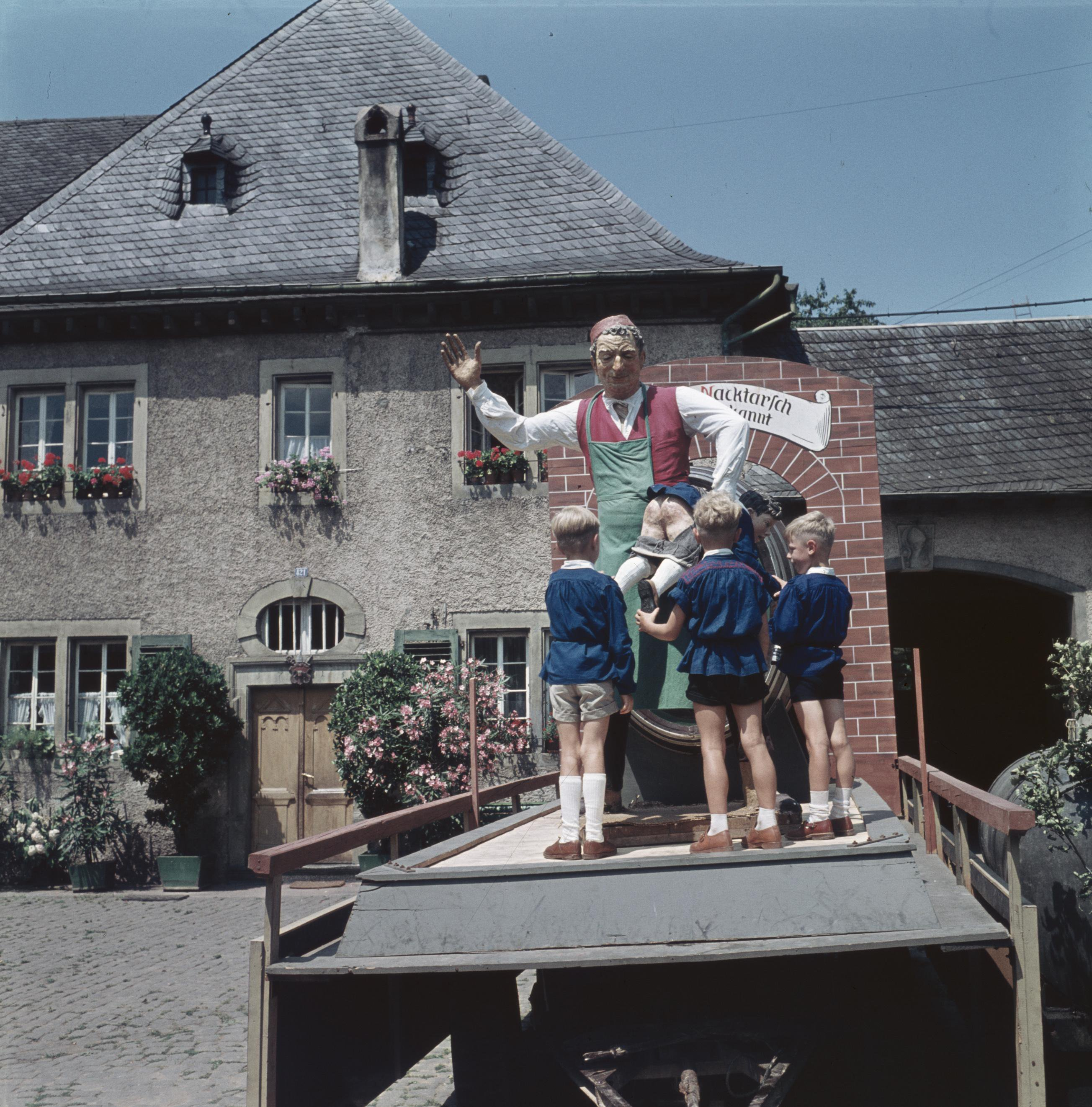 Collectie / Archief : Fotocollectie Van de Poll Reportage / Serie : Moezel: Klederdracht- en wijnfeest Beschrijving : Jongens bekijken de praalwagen met reclame voor de wijn van Kröver Nacktarsch Datum : 4 juli 1959 Locatie : Duitsland, Kröv, Rijnland-Palts, West-Duitsland Trefwoorden : praalwagens, volksfeesten Fotograaf : Poll, Willem van de, [onbekend] Auteursrechthebbende : Nationaal Archief Materiaalsoort : Glasnegatief Nummer archiefinventaris : bekijk toegang 2.24.14.02 Bestanddeelnummer : 254-6094